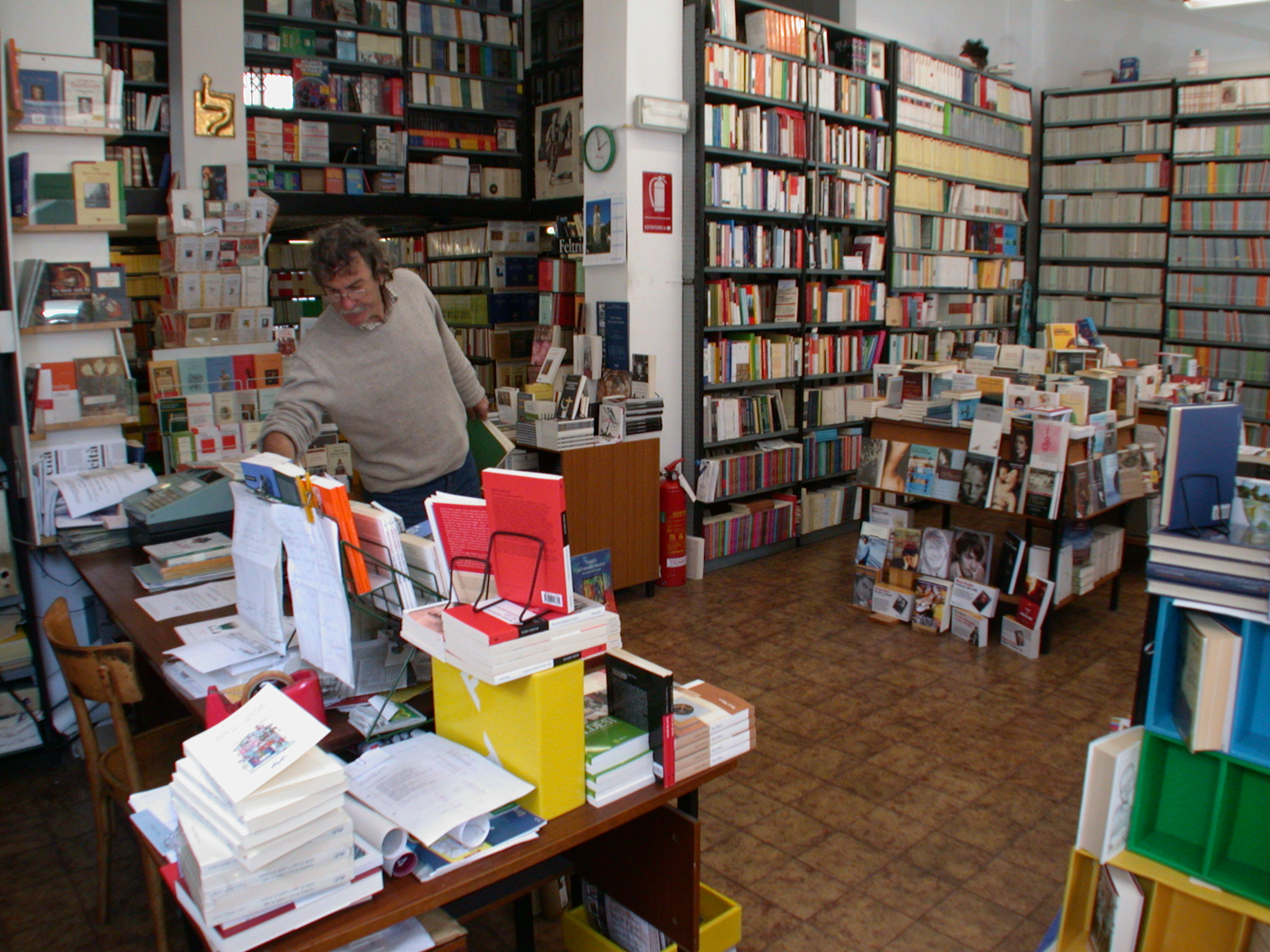 Archivio Claudiana srl, Libreria di Torino